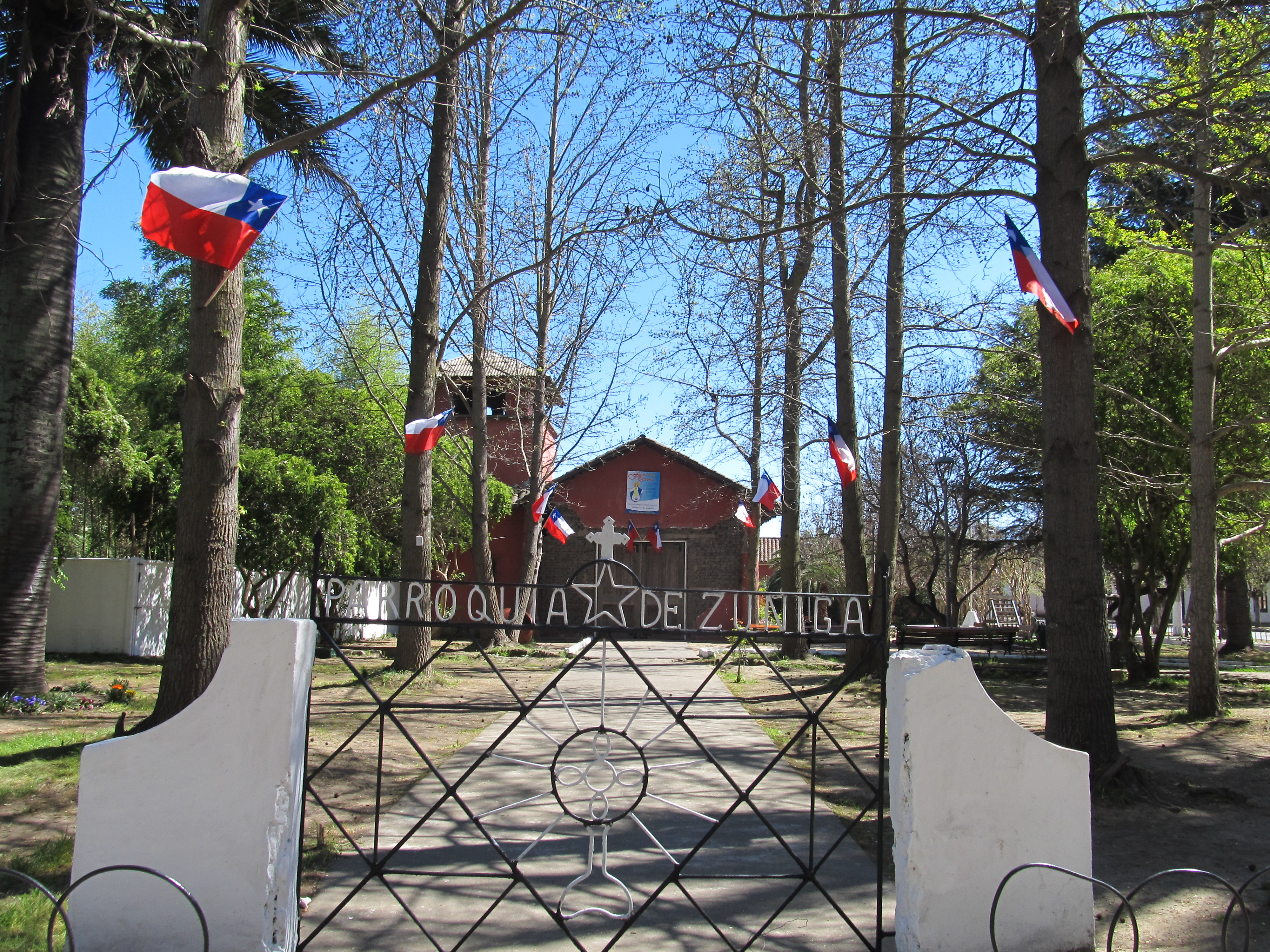 Parroquia Nuestra Señora de la Merced This is a photo of a national monument in Chile: 2088